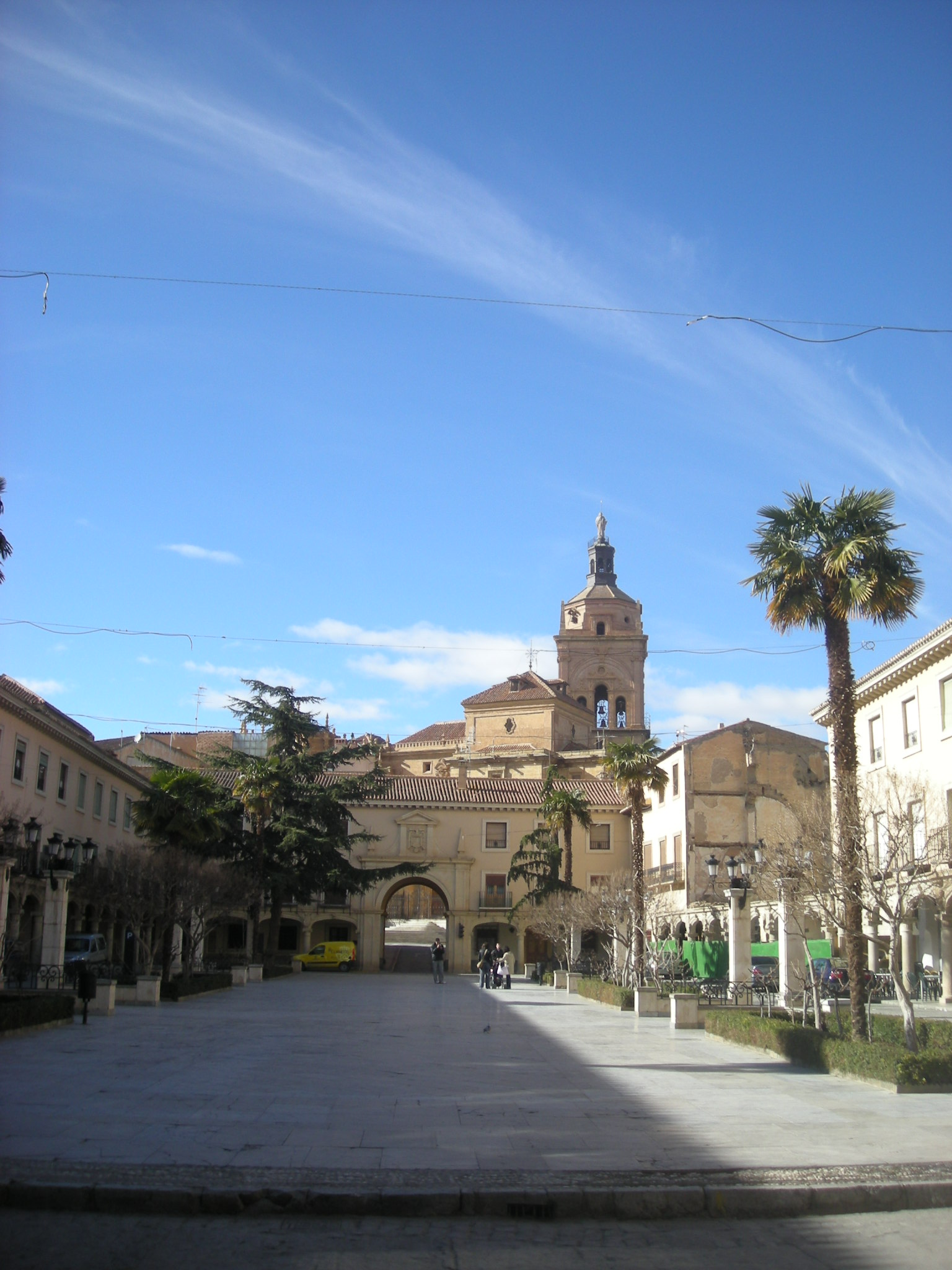 Plaza de la Constitución de Guadix.